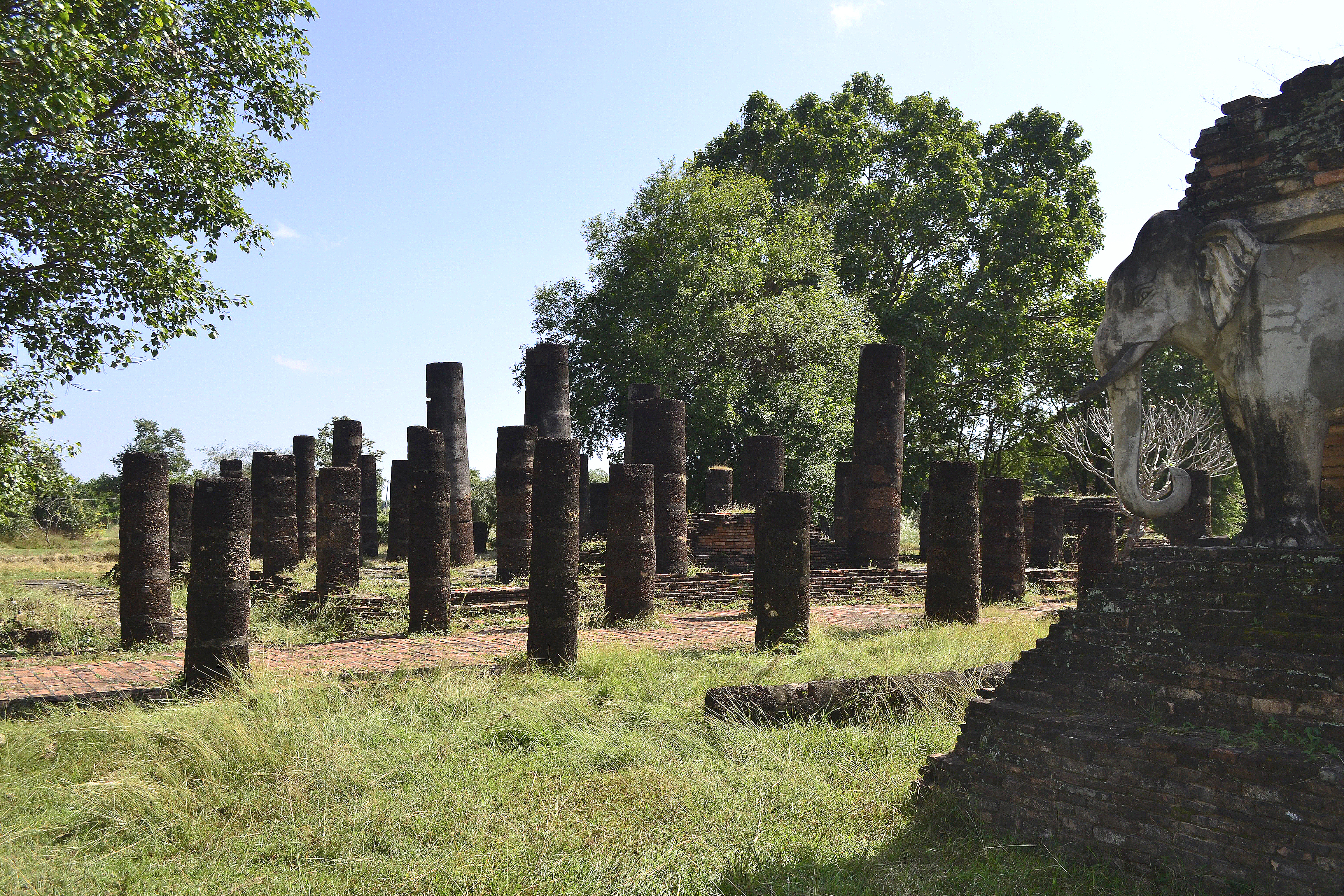 Wat Chang Lom im Geschichtspark Sukhothai